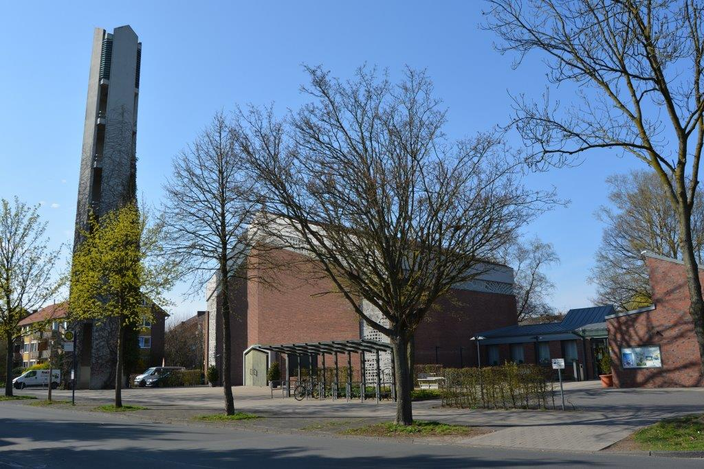 Die Epiphaniaskirche an der Kärntner Straße in Münster.